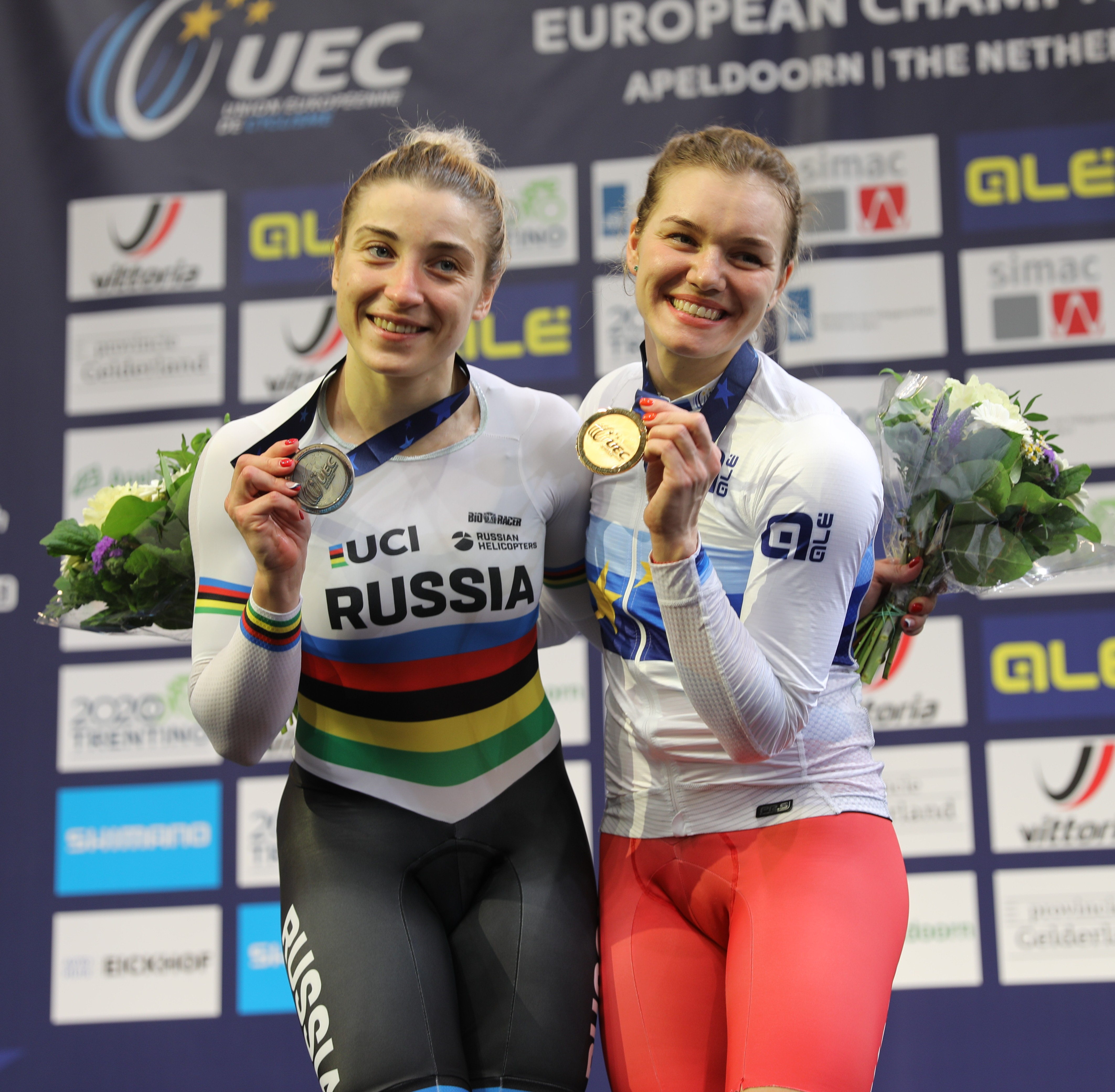 Gold und Silber im Zeitfahren: Anastasia Voynova (r.) und Daria Shmeleva